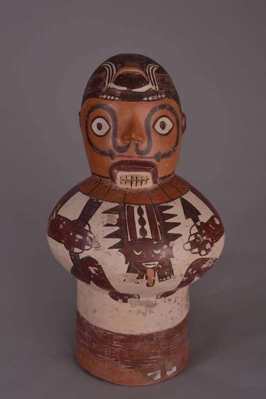 Tamburo aperto, cavo, costituito da una camera cilindrica che si apre in una grande camera globulare centrale alla quale è sovrapposta una piccola camera superiore cefalomorfa con naso, orecchie, labbro superiore, denti incisi e copricapo parzialmente in rilievo. Rappresenta un personaggio seduto che impugna un bastone di comando e la punta di un dardo. Indossa una collana ed un copricapo raffigurante un rospo. Dalla collana fuoriescono due serpenti affrontati.